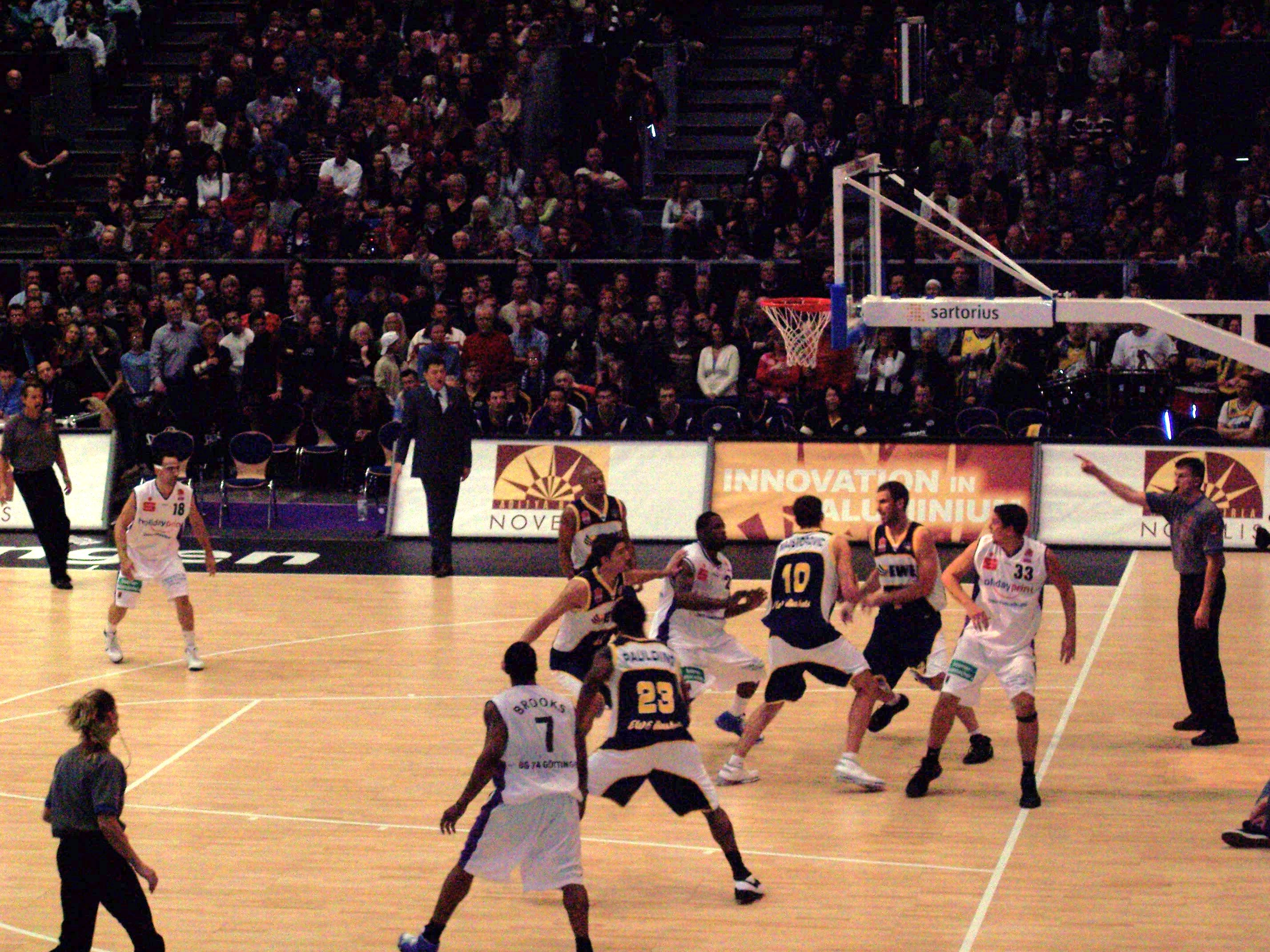 BG 74 Göttingen vs. EWE Baskets Oldenburg